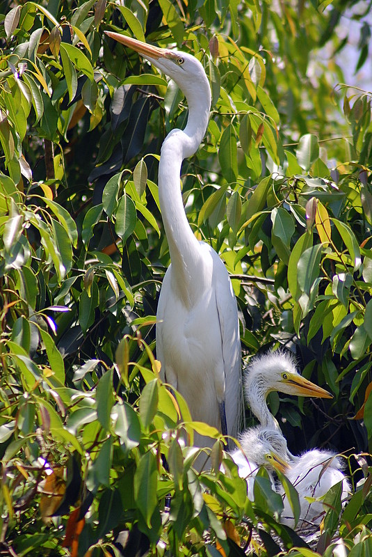 Jardim Botânico de São Paulo